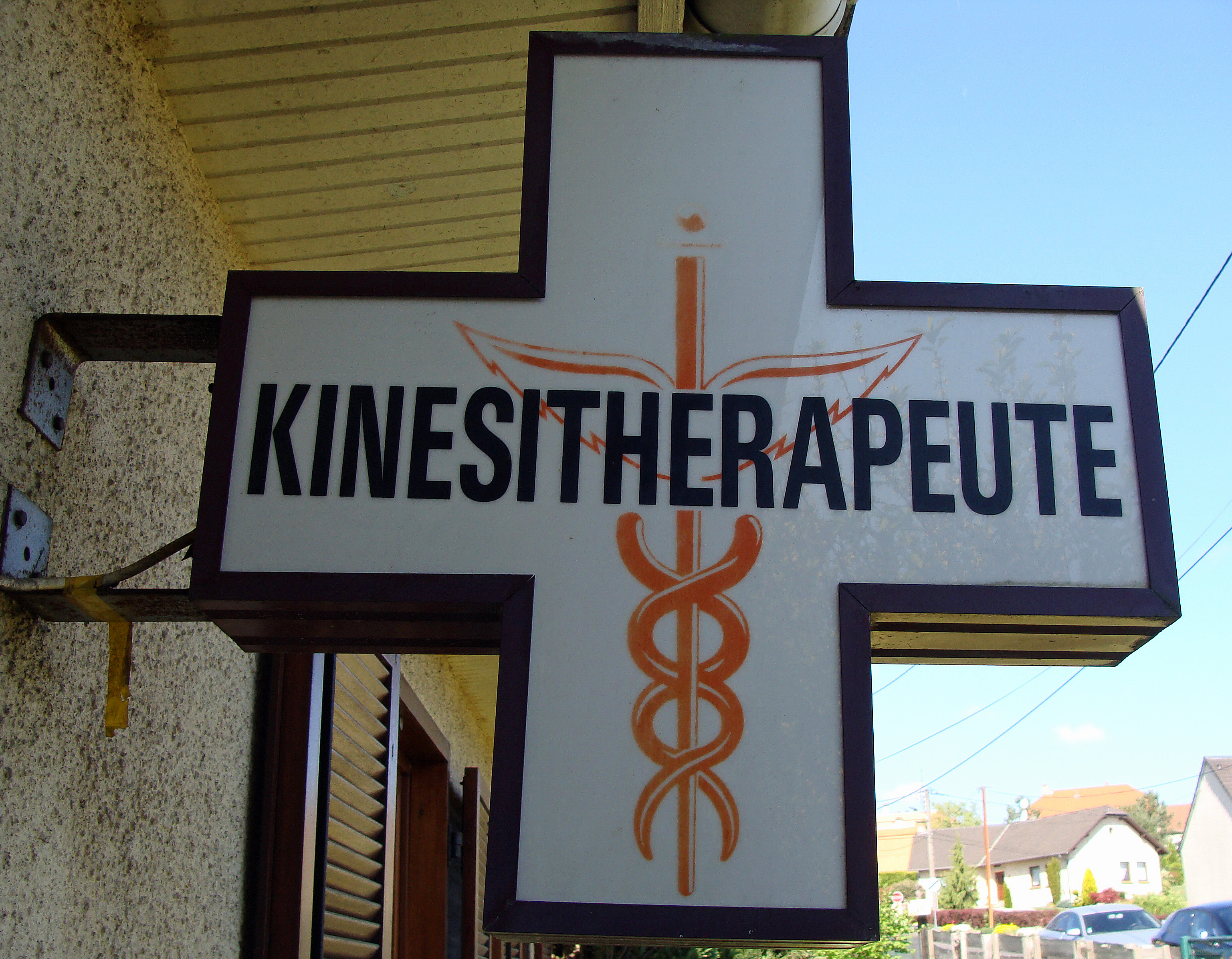 Enseigne d'un cabinet de kinésithérapie, rue du Stade à L'Hôpital (Moselle)